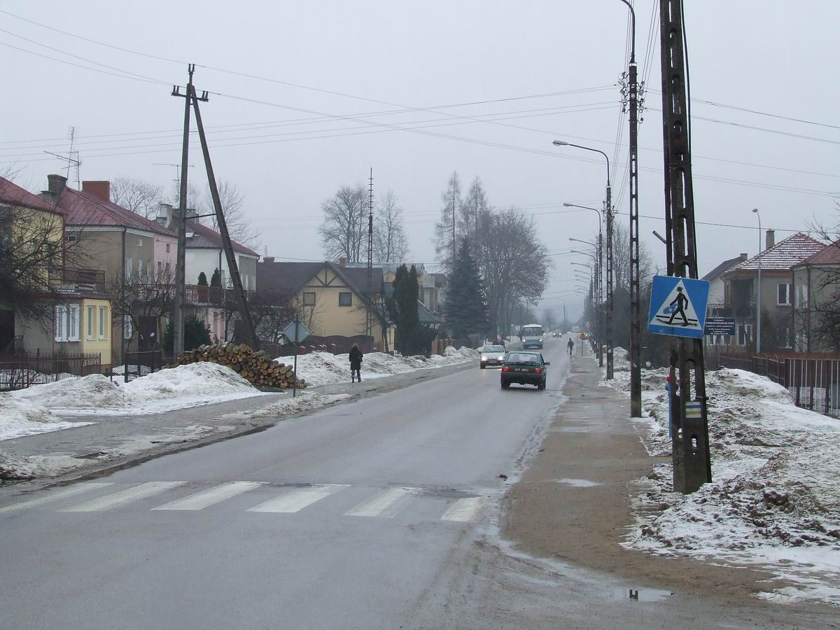 Czarna Białostocka, ul. Piłsudskiego (przy rynku)